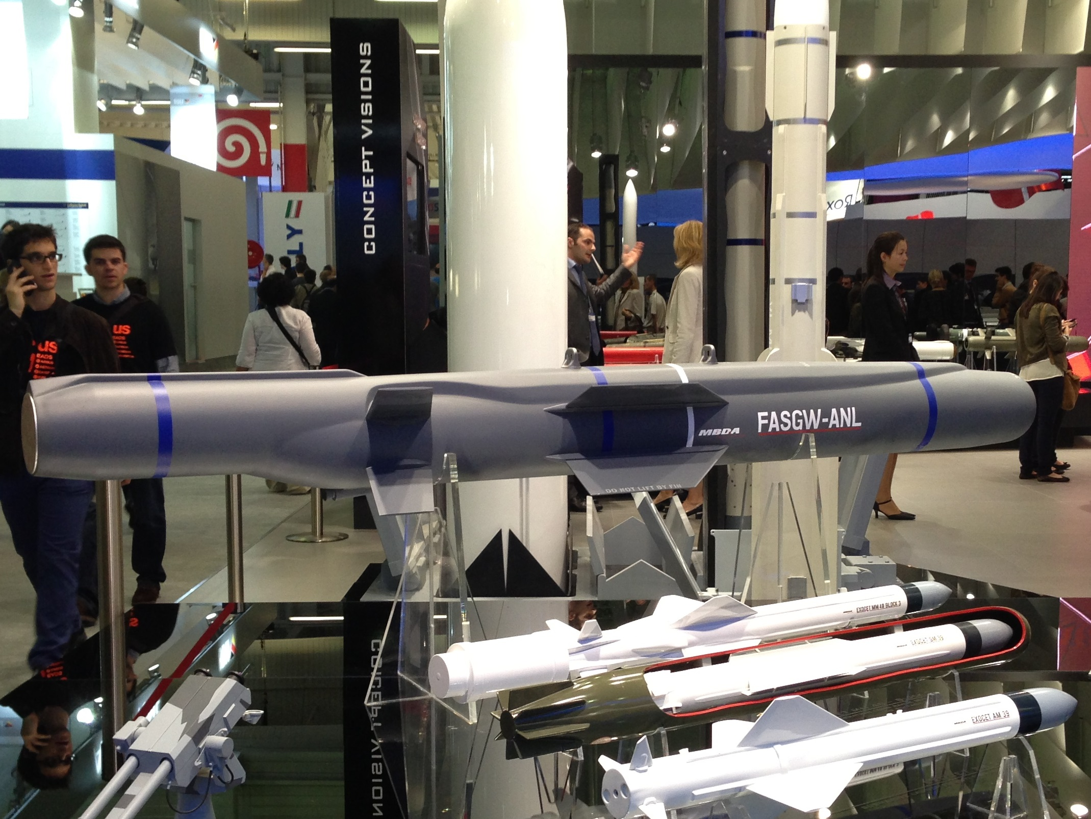 Maquette du missile FASGW-ANL. Stand de la société MBDA au salon du Bourget 2013.